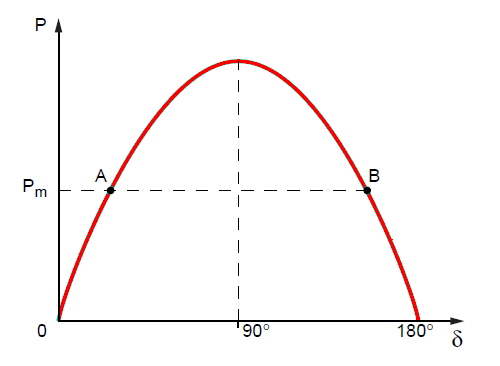 Représentation des 2 positions d'équilibre de l'angle interne pour un moteur synchrone.